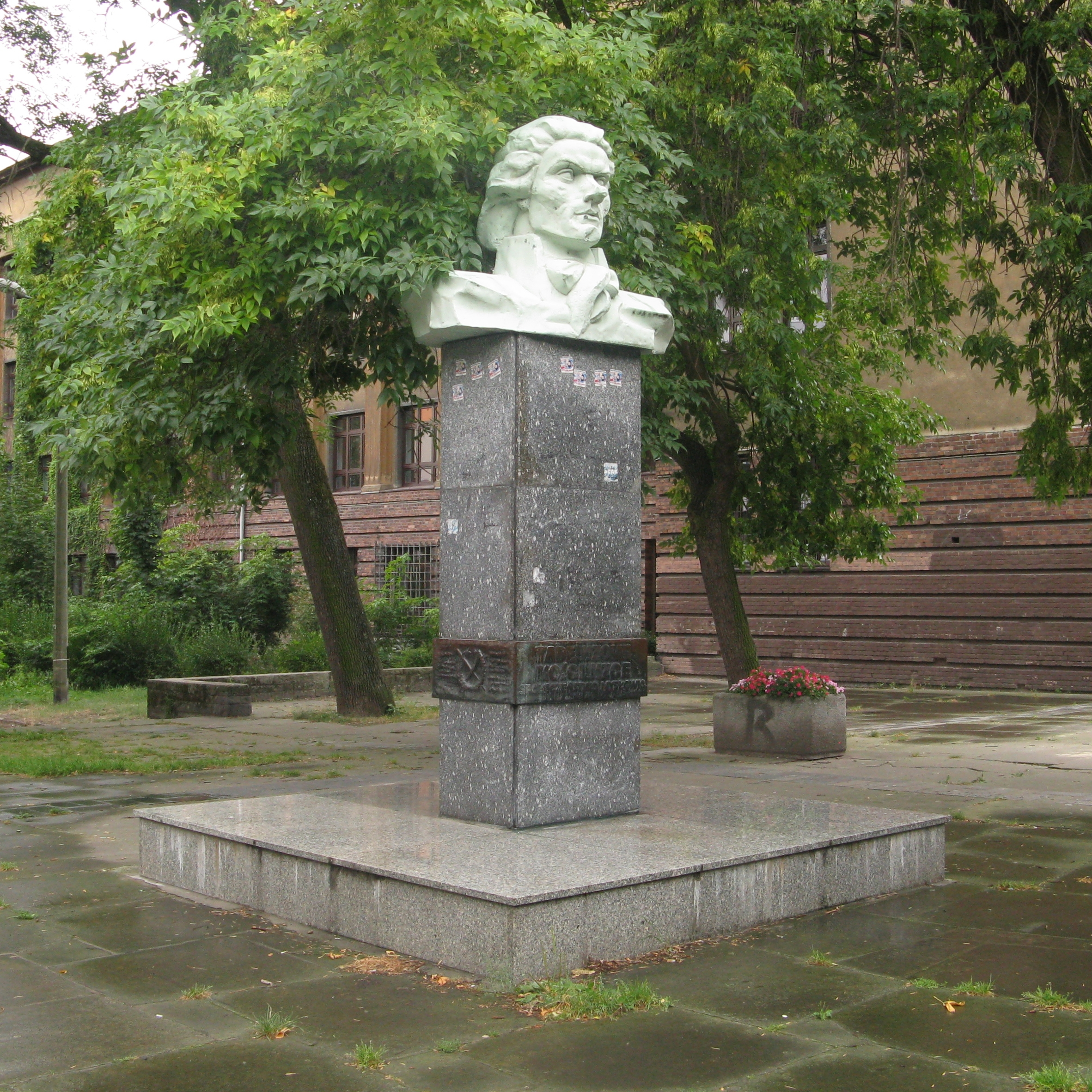 Pomnik Tadeusza Kościuszki w Mysłowicach przy ul. Adama Mickiewicza, obok szkoły podstawowej nr 5.